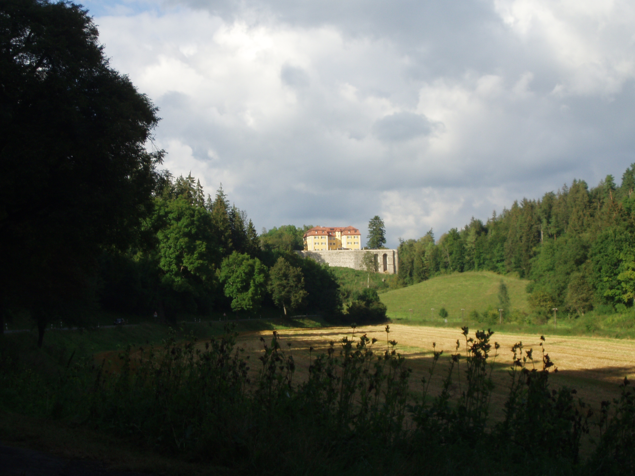 Grafeneck